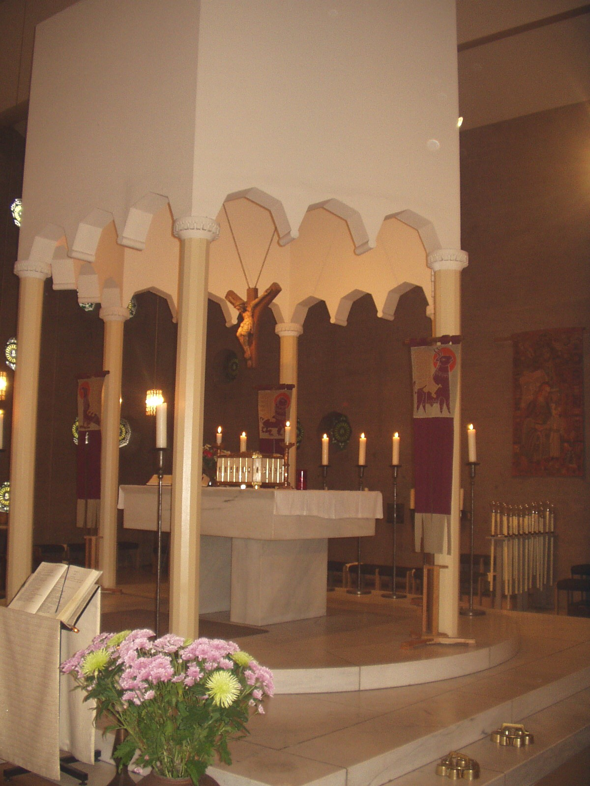 Altar der Kirche Heilige Familie,Köln-Sülz